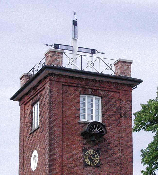 Zeigertelegraph in Brake/Unterweser, Germany